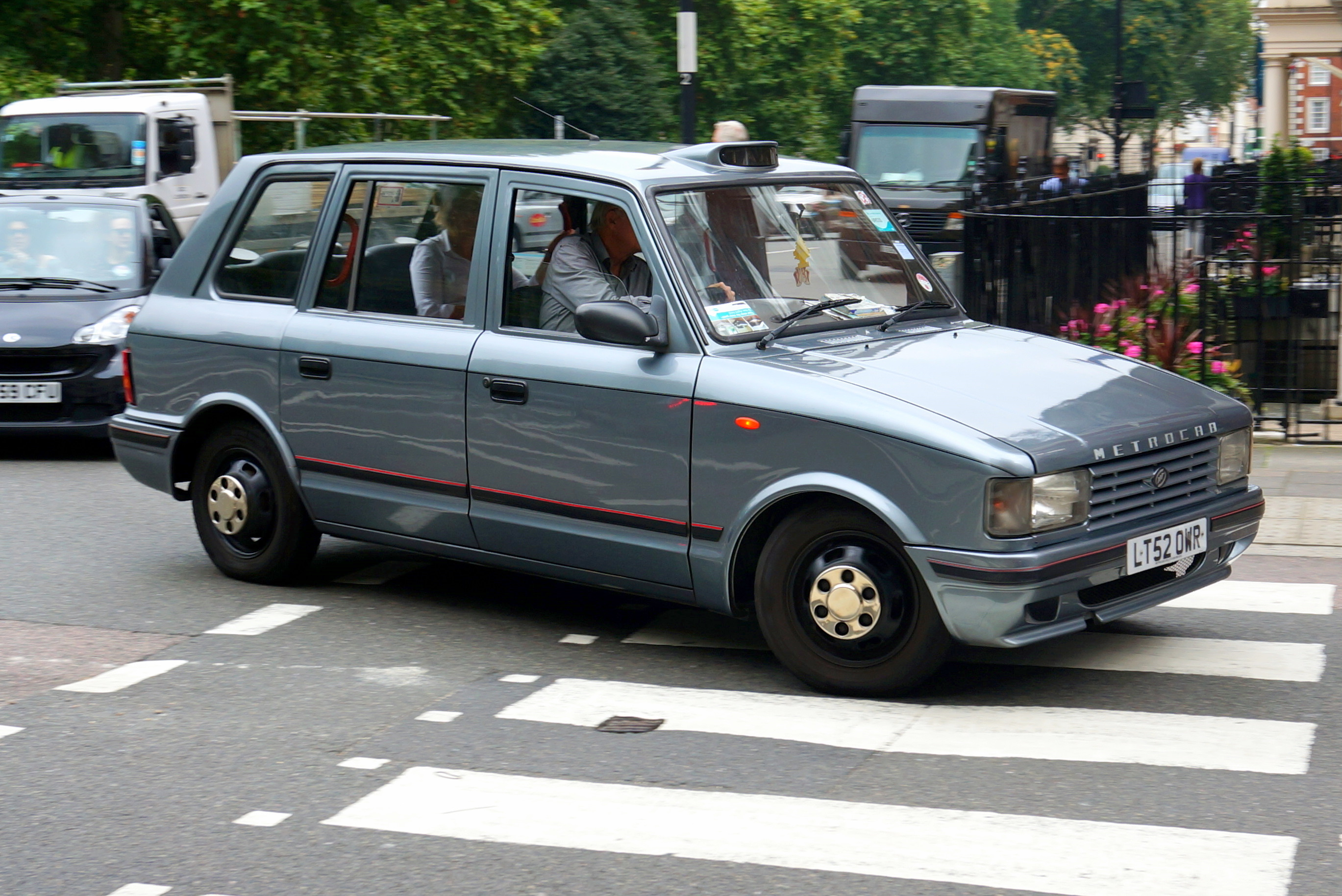 Londyńska taksówka Metrocab TTT w 2014 r.